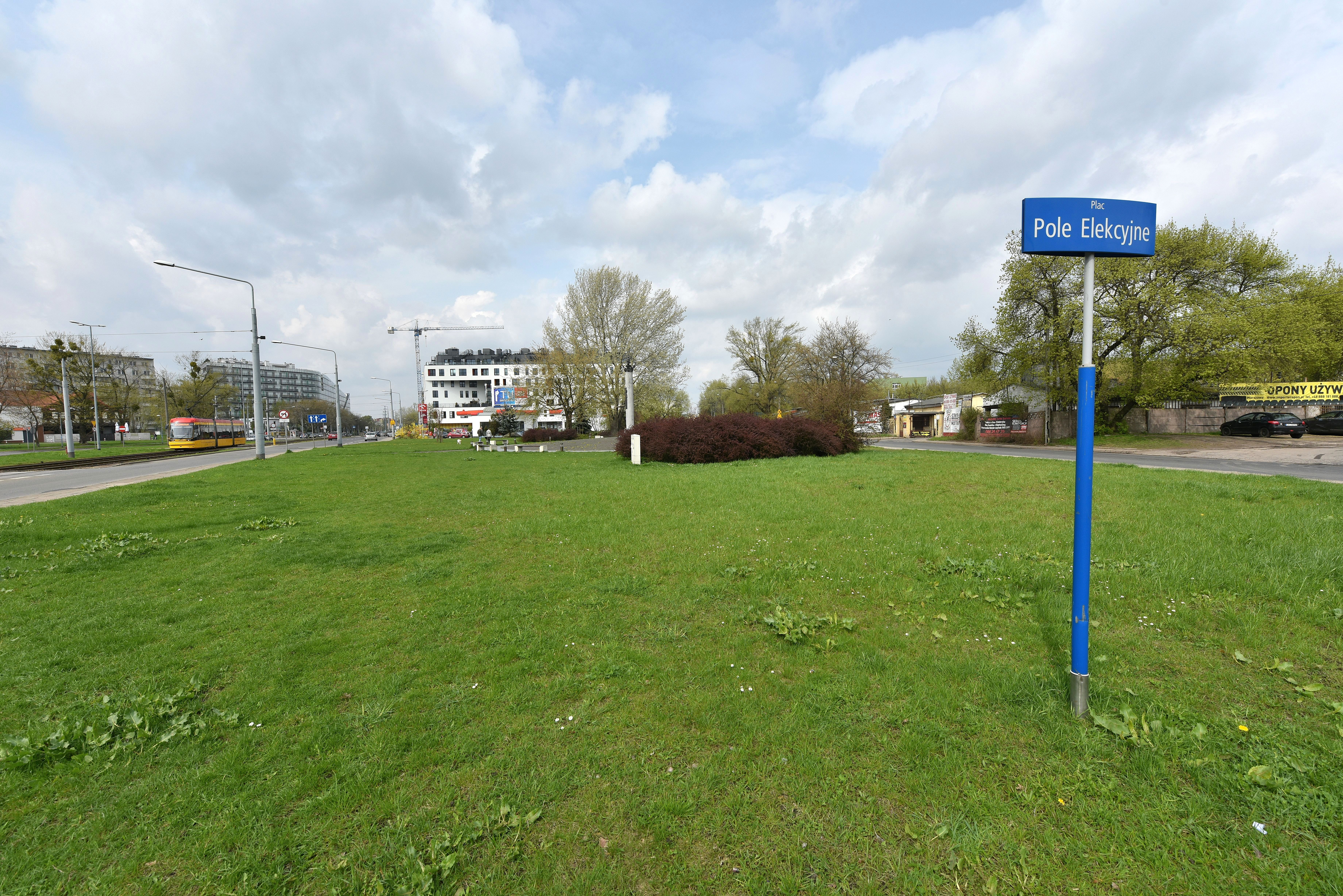 Plac Pole Elekcyjne w Warszawie